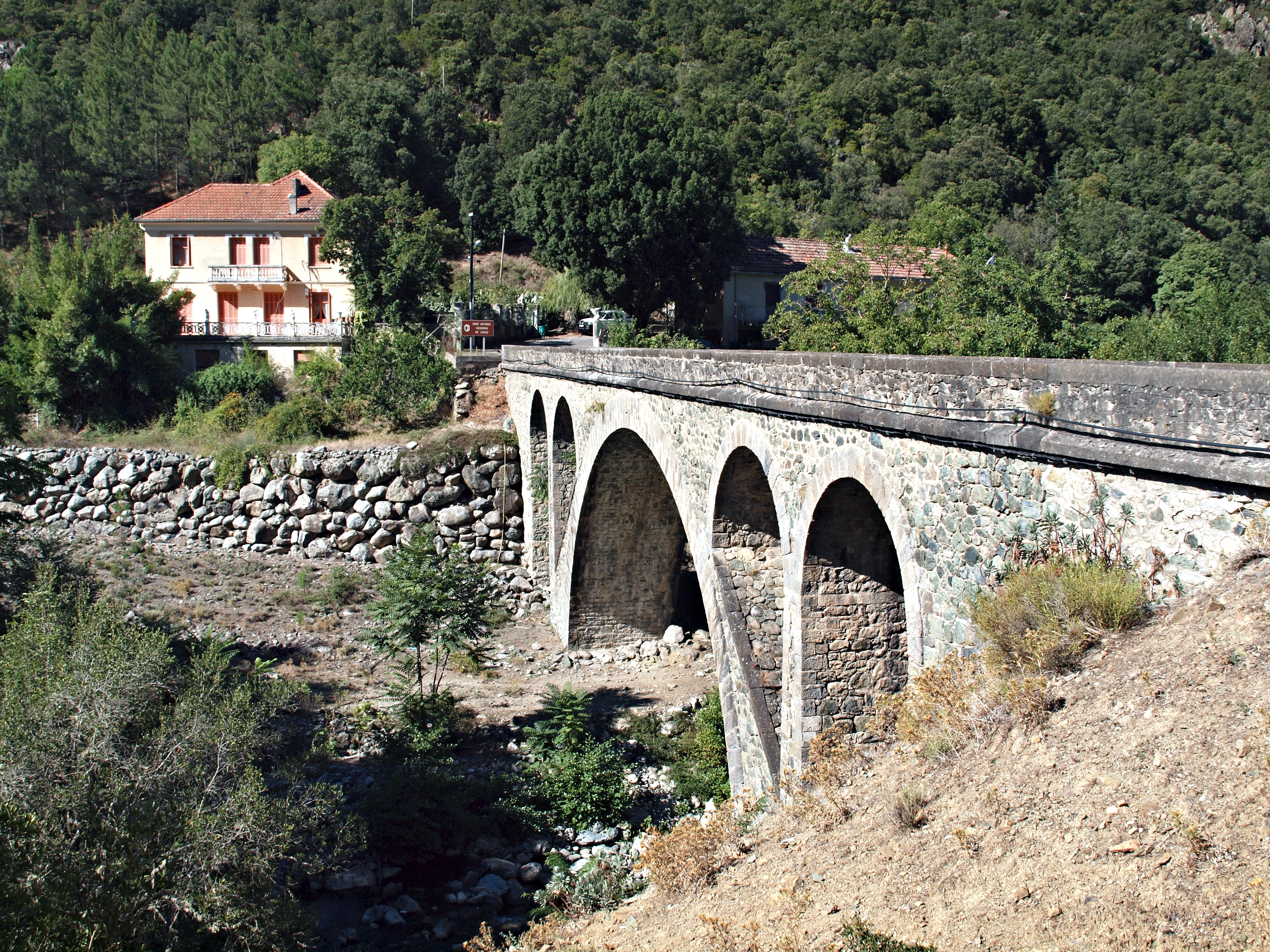 Lano, Casaluna (Corse) - Pont de la route D139 sur la rivière Casaluna